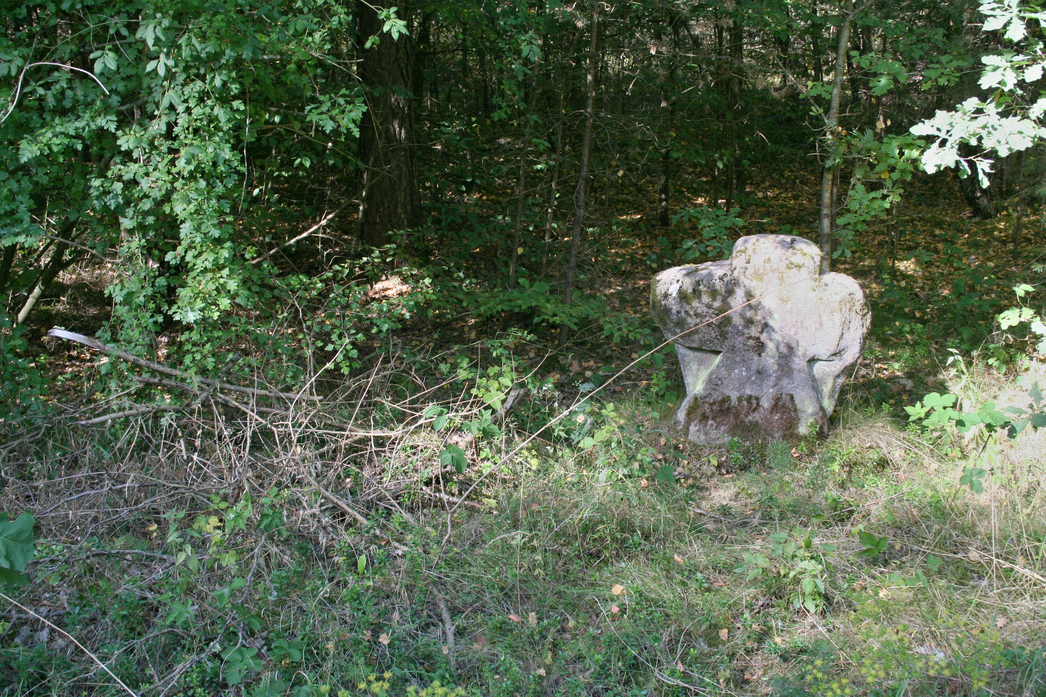 Steinkreuz nahe Sperberslohe